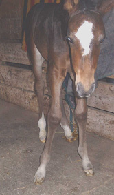 Xbent